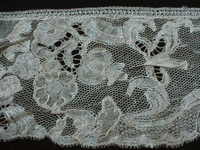 antique lace